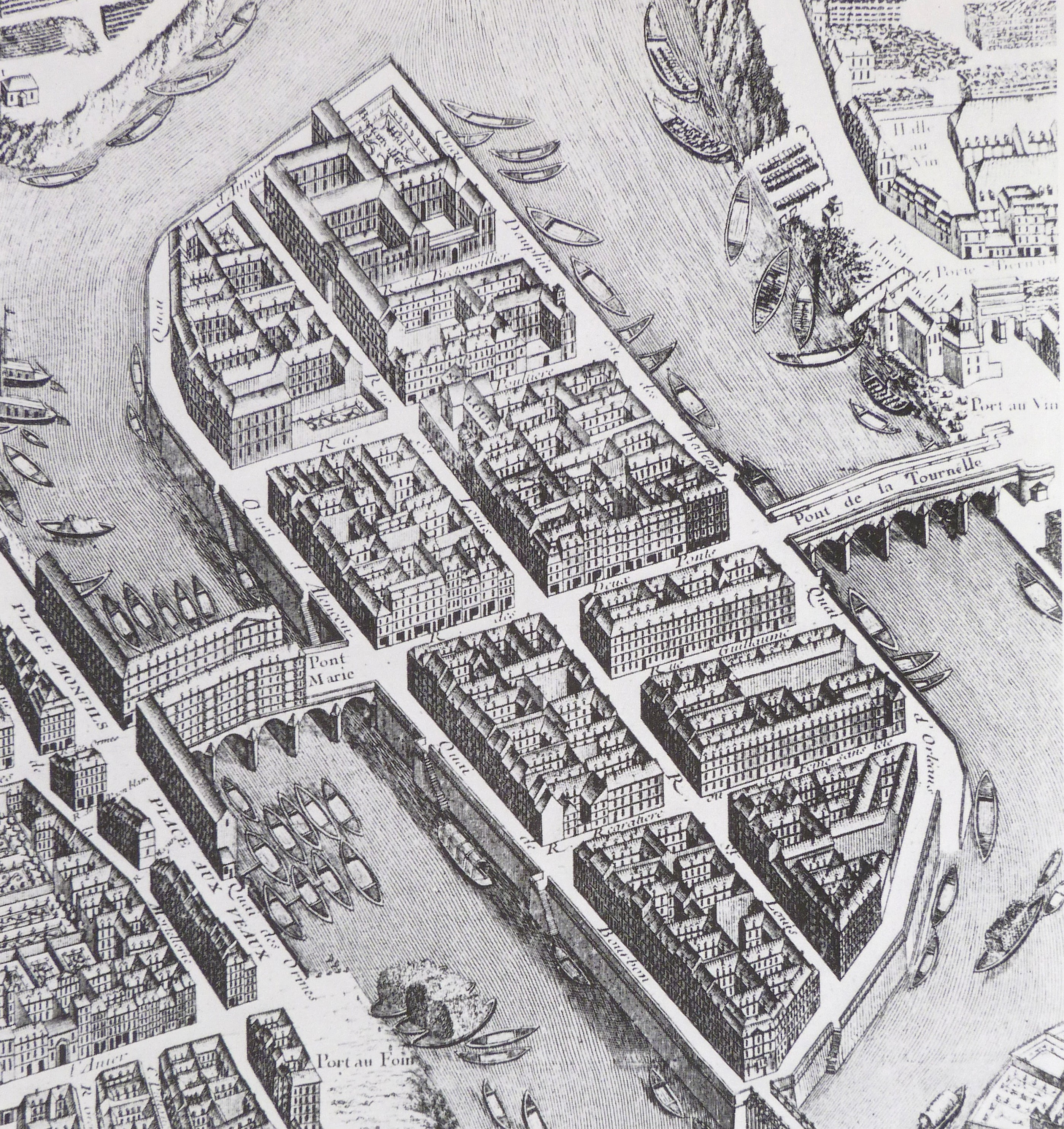 Plan de Paris dit Plan de Turgot, dessiné par Louis Bretez, gravé en 1739. Détail : l'île aint-Louis.